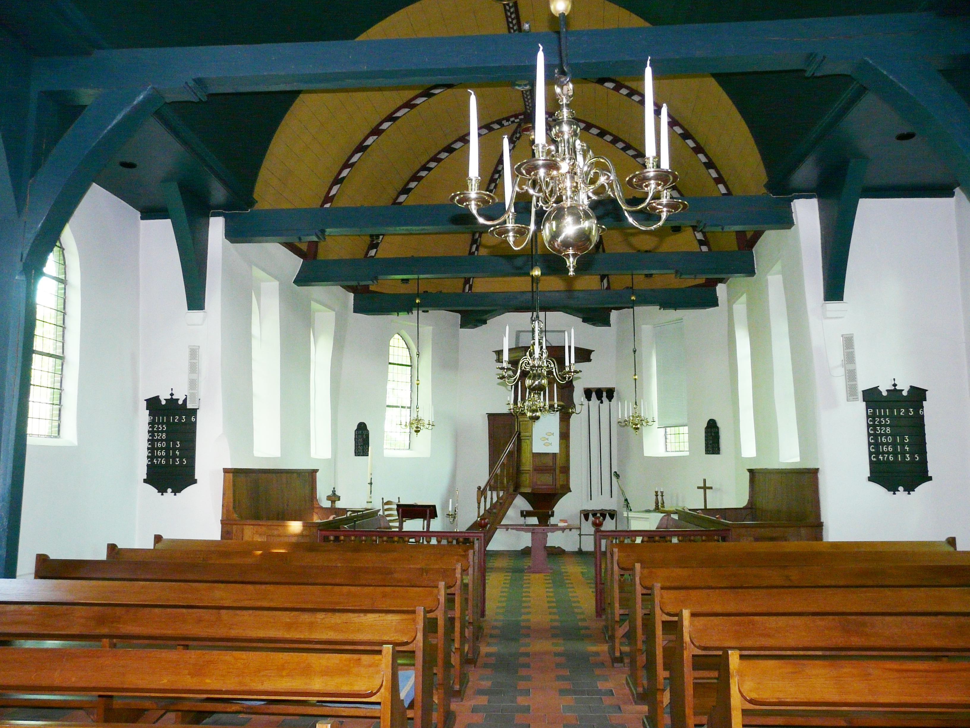 Interieur Nederlands hervormde kerk in Nijeveen